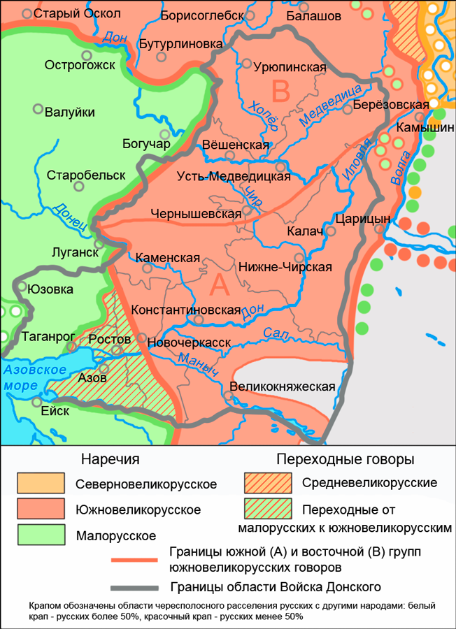 Фрагмент диалектологической карты русского языка 1914 года - территория области Войска Донского. Источники: Brockhaus and Efron Encyclopedic Dictionary b54 360-1.jpg Dialektologicheskaia Karta 1914 goda.jpeg